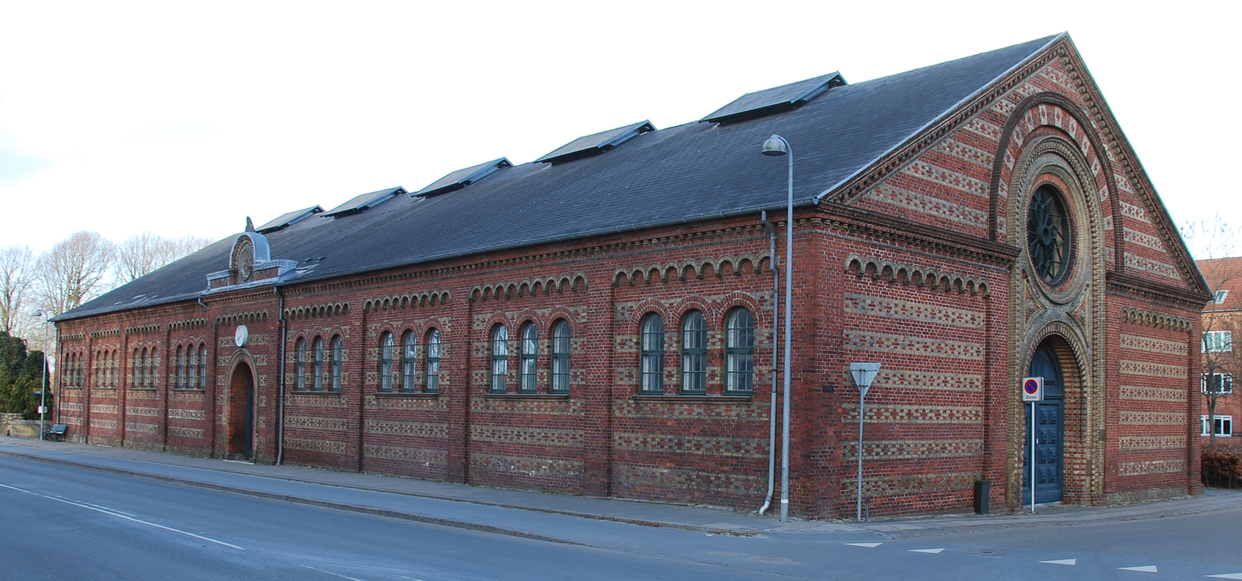 Den fredede bygning "Eksercerhuset" i Viborg.